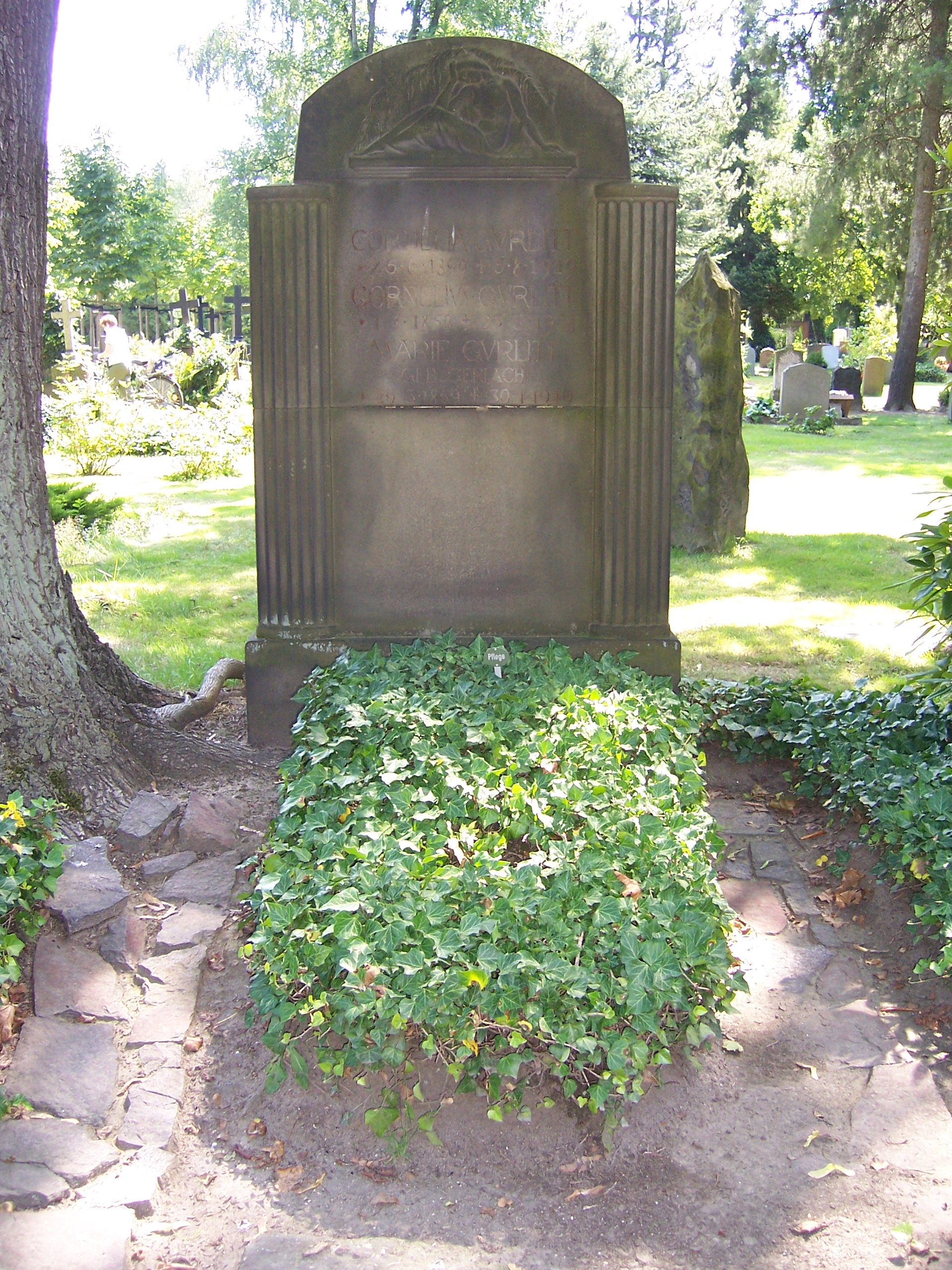 Cornelius Gurlitts Grab auf dem Johannisfriedhof in Dresden